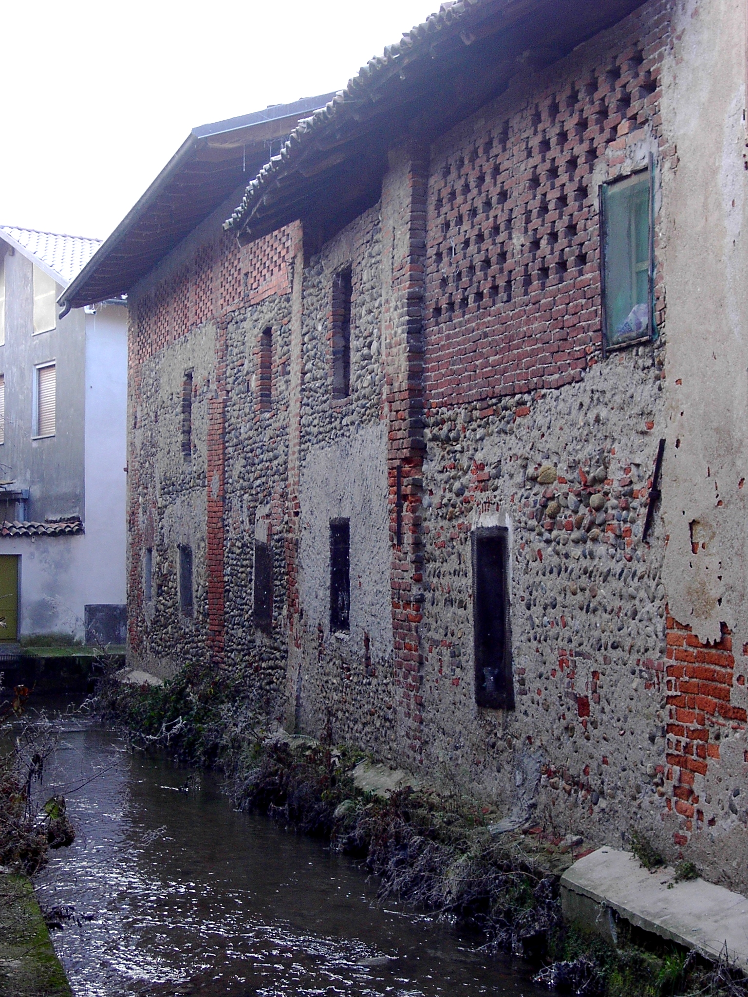 Fara Novarese, la roggia presso via Cavour